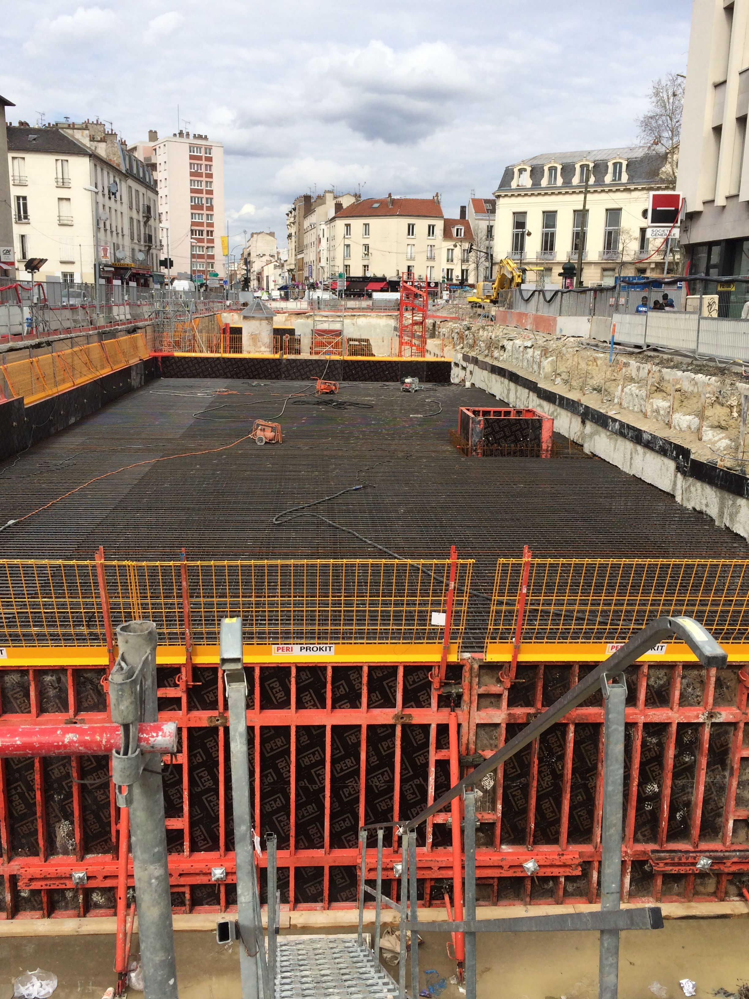 La station de métro "Mairie d'Aubervilliers" en construction avenue Victor à Aubervilliers en avril 2016.